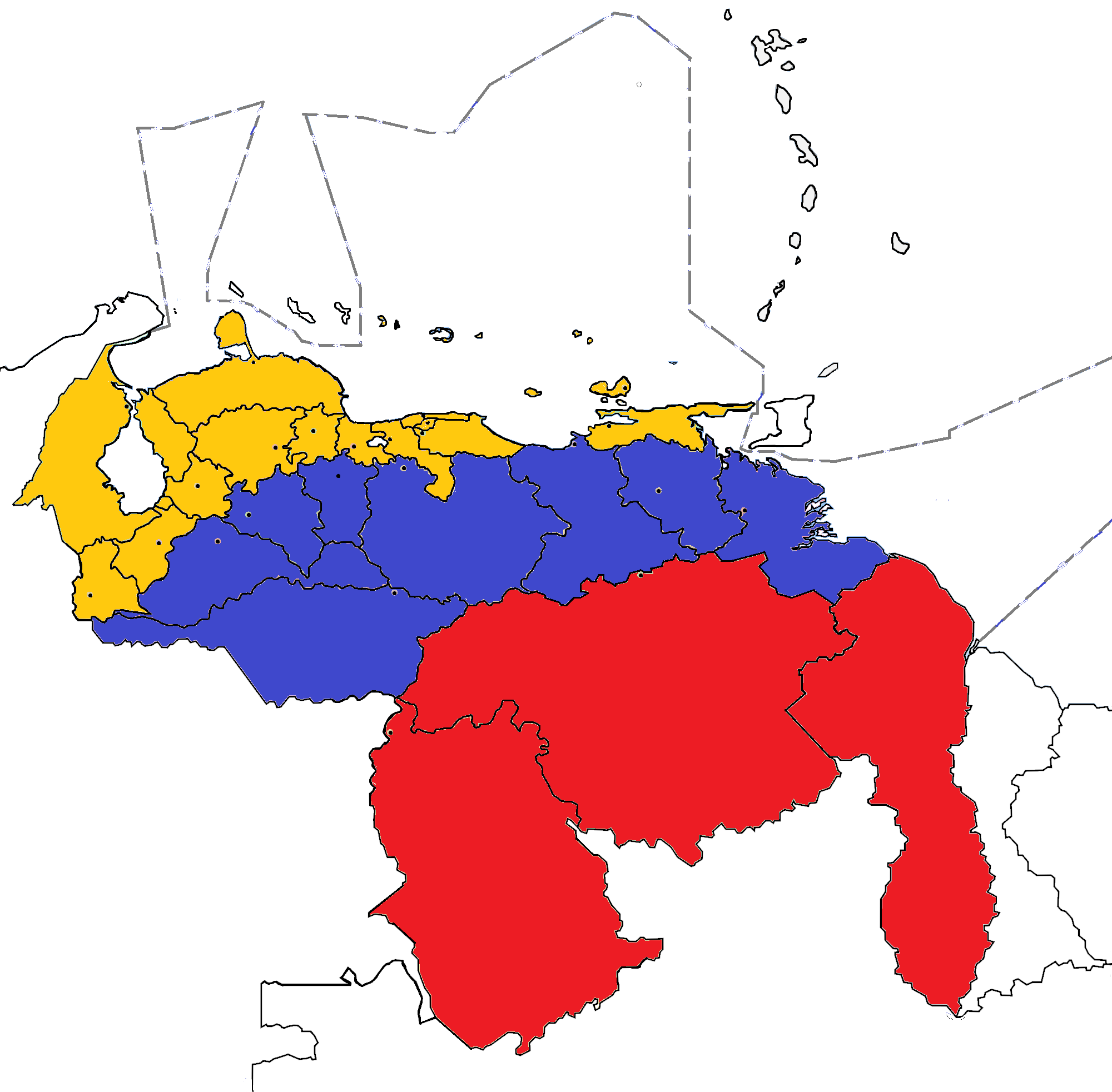 Mapa Completo de la República Bolivariana de Venezuela. incluye su espacio maritimo, mar territorial, zona contigua, zona económica exclusiva y parte de alta mar